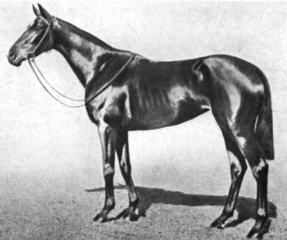 1921 Epsom Oaks winner Love in Idleness.